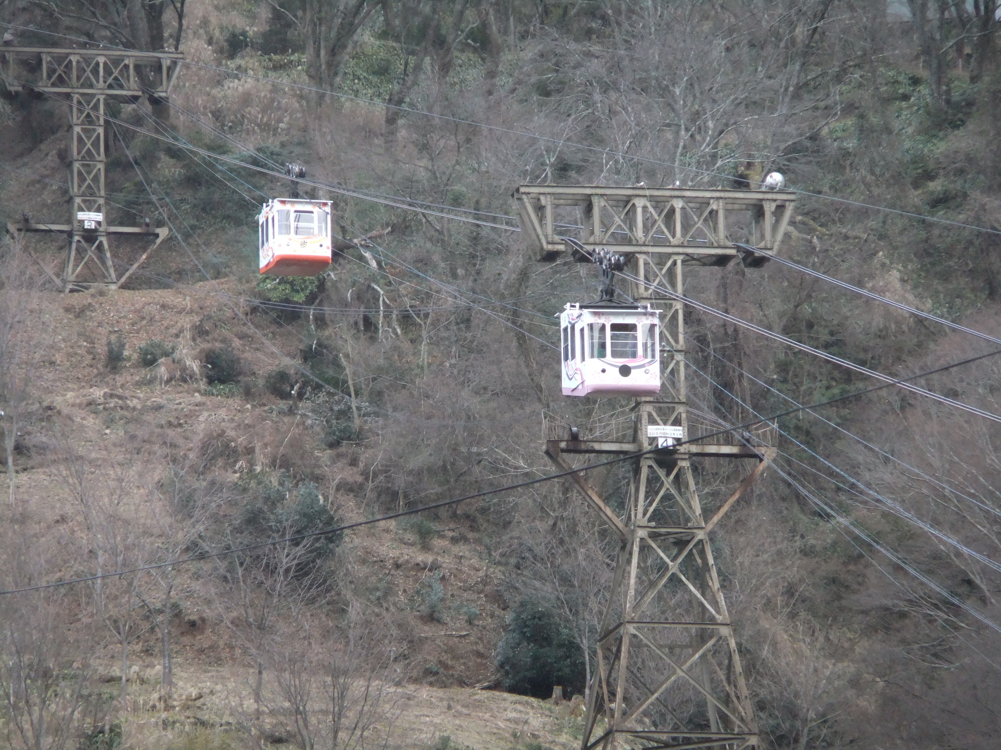 吉野ロープウェイ(現行塗装)